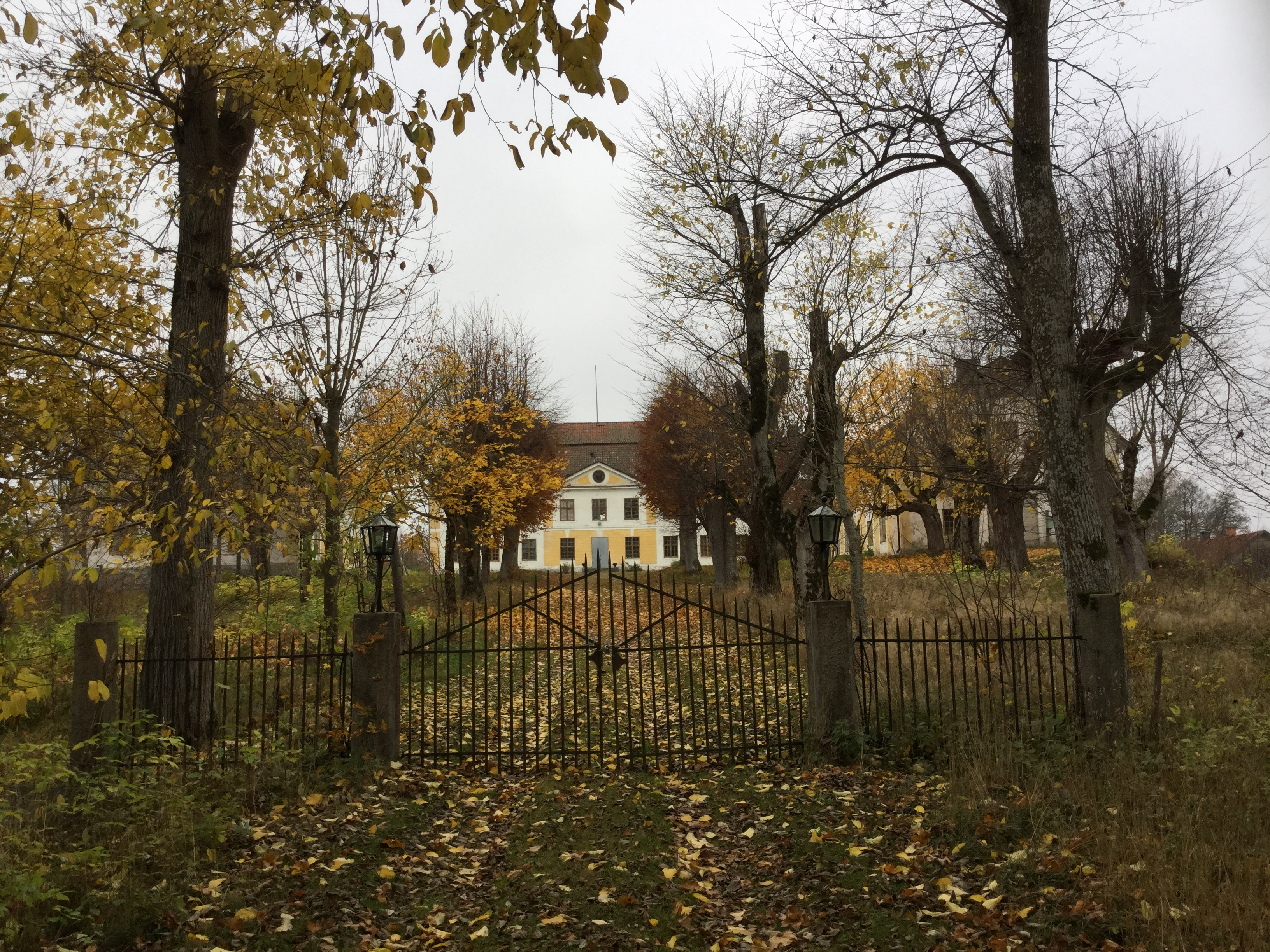 Regnaholm, 1 november 2015